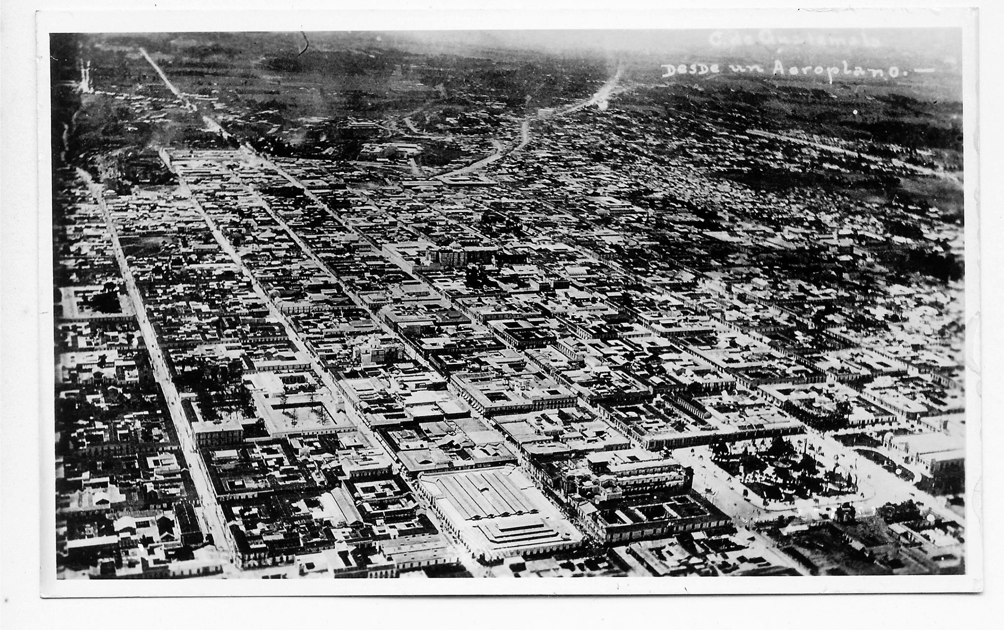 Ciudad de Guatemala en 1921. Ya se había recuperado un poco de los terremotos de 1917-18.